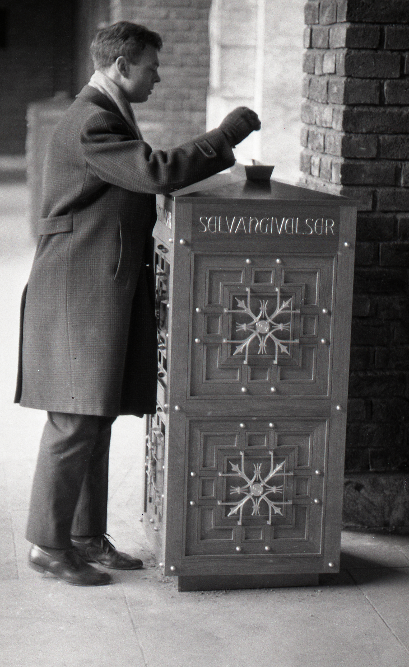 Bildet er hentet fra Arkivverket. Levering av selvangivelsen i 1963. Kasse til å legge selvangivelsen i. Menn som putter selvangivelsen opp i kassen. Kasssen sto i Rådhusets borggård i Oslo. Skrevet på konvolutten: "Koster ca. kr. 11 000,-" (angivelig er det kassen som koster ca. 11 000 kroner) Arkivinstitusjon : Riksarkivet Arkivnavn : Billedbladet NÅ Sted : NORGE, Oslo, Oslo, Emneord: skatt, penger, selvangivelse, beskatning, oslo, rådhus, økonomi Avbildet: Ukjent